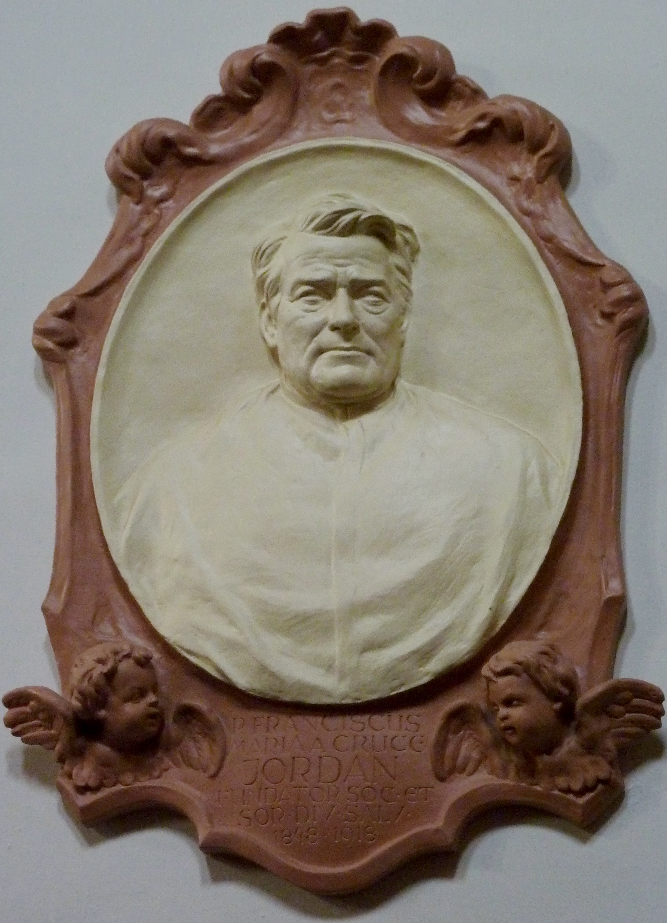 Katholische Pfarrkirche St. Maria und Potentinus, Klosterkirche der ehemaligen Prämonstratenserabtei Kloster Steinfeld in Steinfeld, einem Ortsteil von Kall im Kreis Euskirchen (Nordrhein-Westfalen), Relief mit Darstellung von Franziskus Maria vom Kreuze Jordan